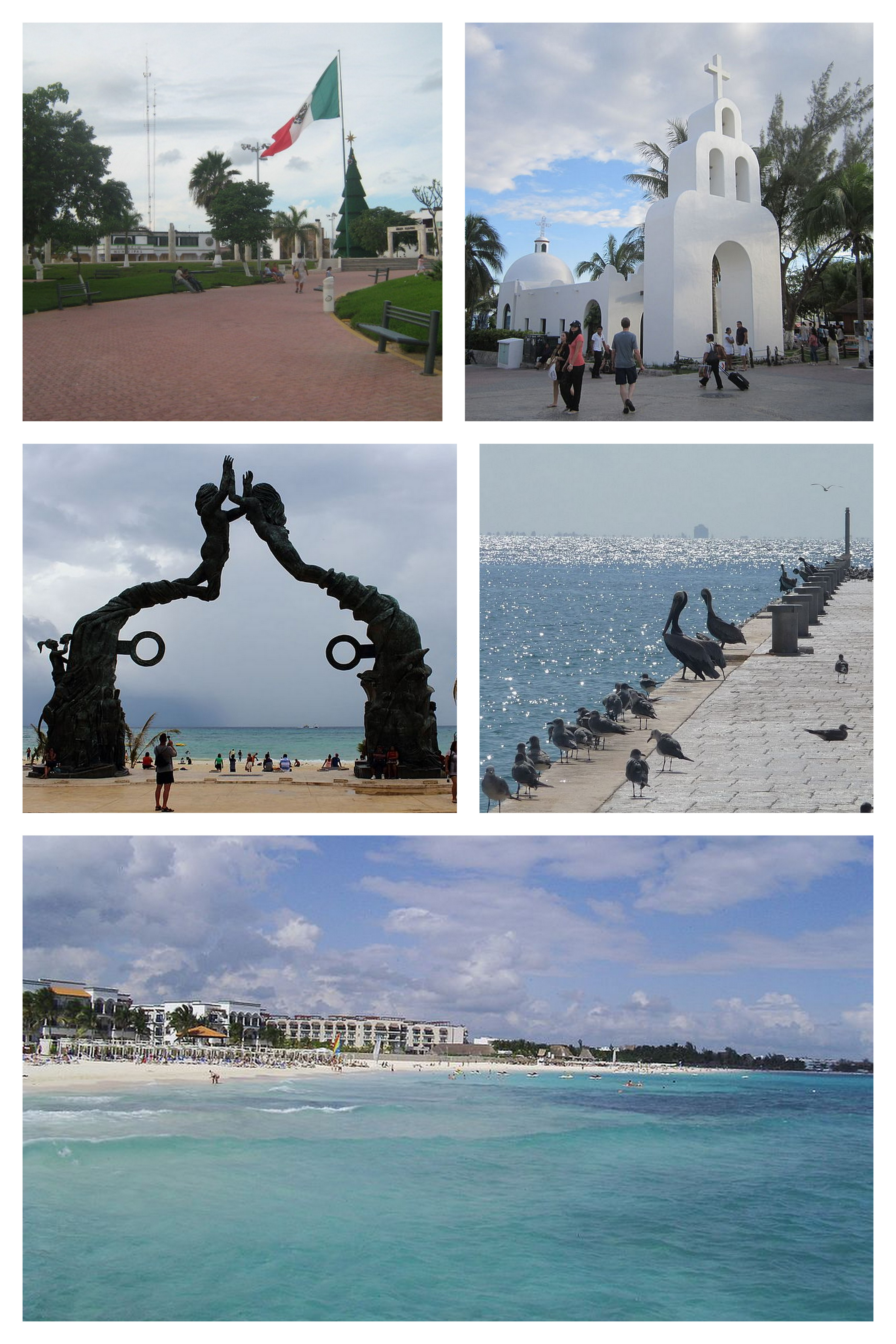 Montaje creado a partir de cinco imágenes en Wikimedia Commons: File:Playa Del Carmen - panoramio.jpg File:Catholic Chapel of Our Lady of Carmen in Playa del Carmen.JPG File:Plaza, Playa del Carmen. - panoramio.jpg File:Serie de fotografías en Playa del Carmen 20.jpg File:Playa del Carmen, Quintana Roo, Mexico - panoramio (2).jpg